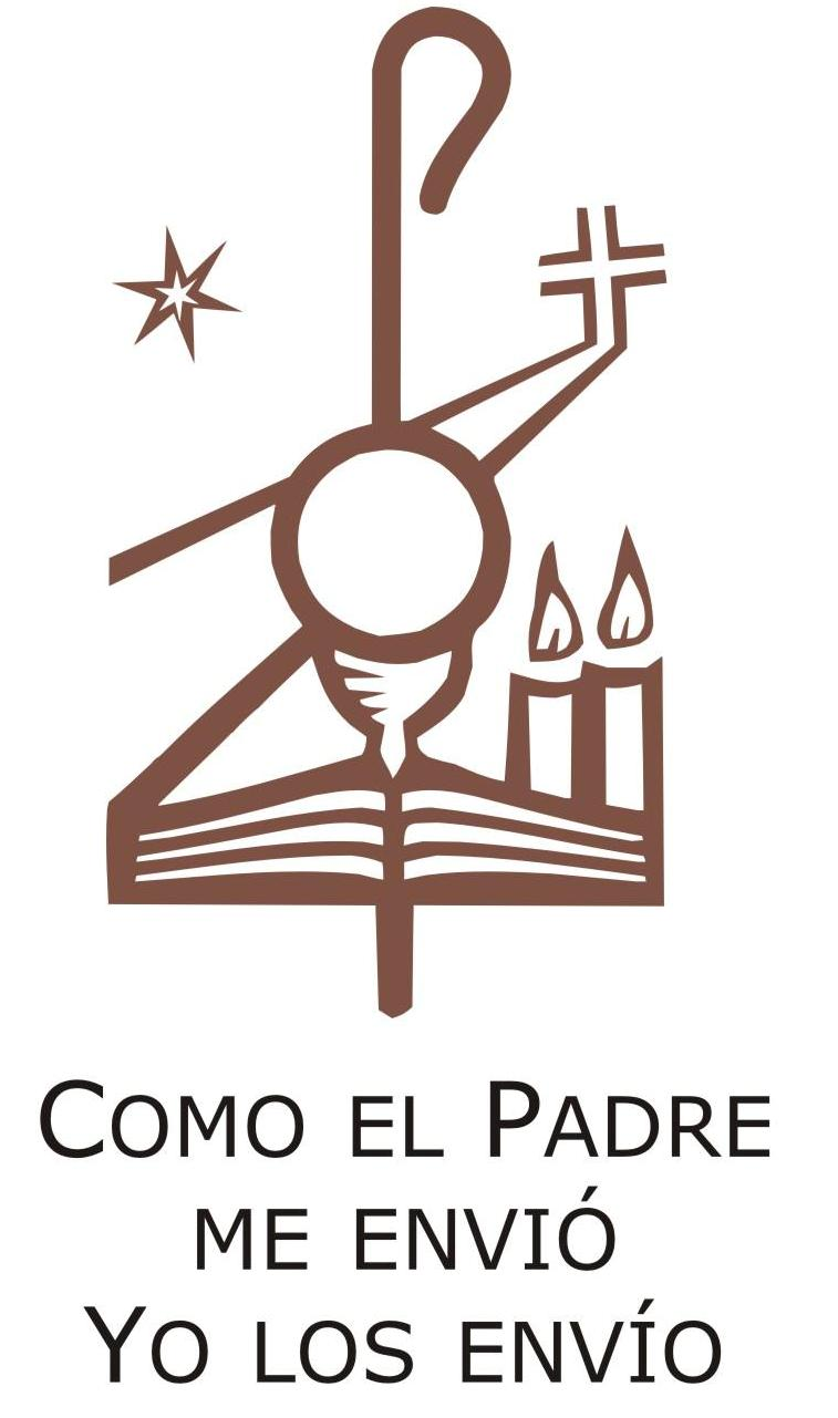 Logo de Monseñor Miguel Angél D´Annibale